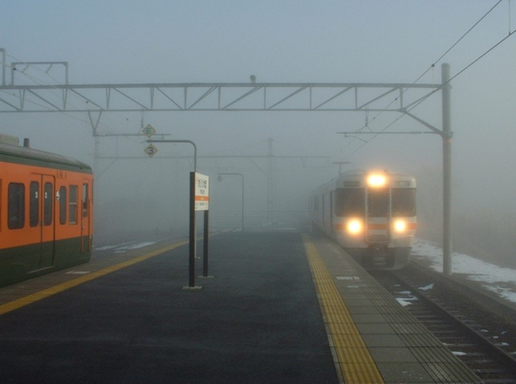 甲斐岩間駅、霧の朝の交換 313系が到着